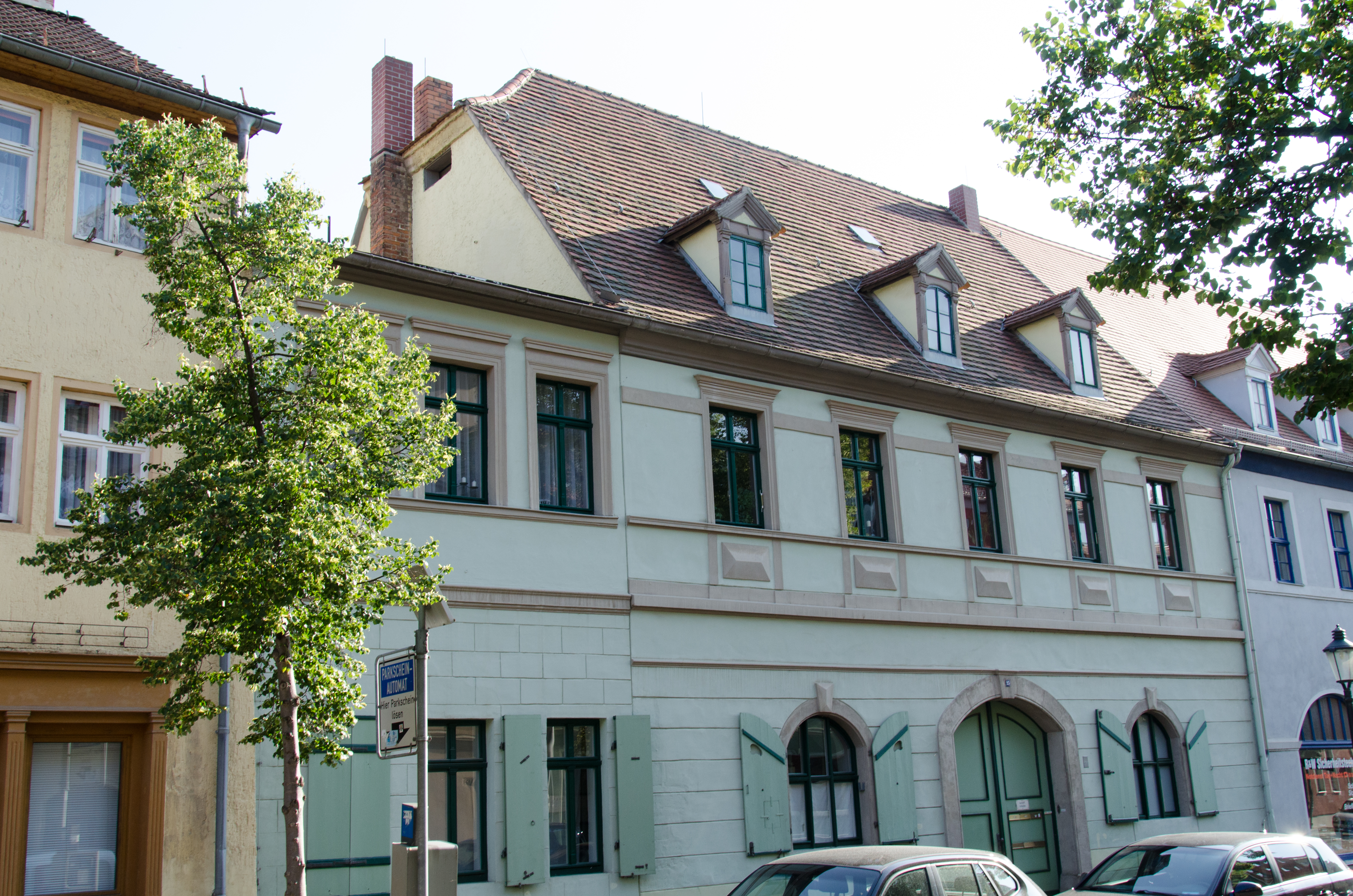 Naumburg, Fischstraße 25